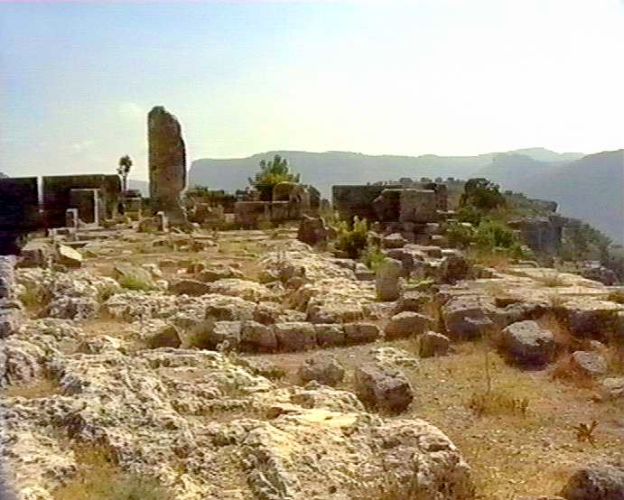 Meydancik Kalesi (Kirschu), antike Festung bei Gülnar, Südtürkei